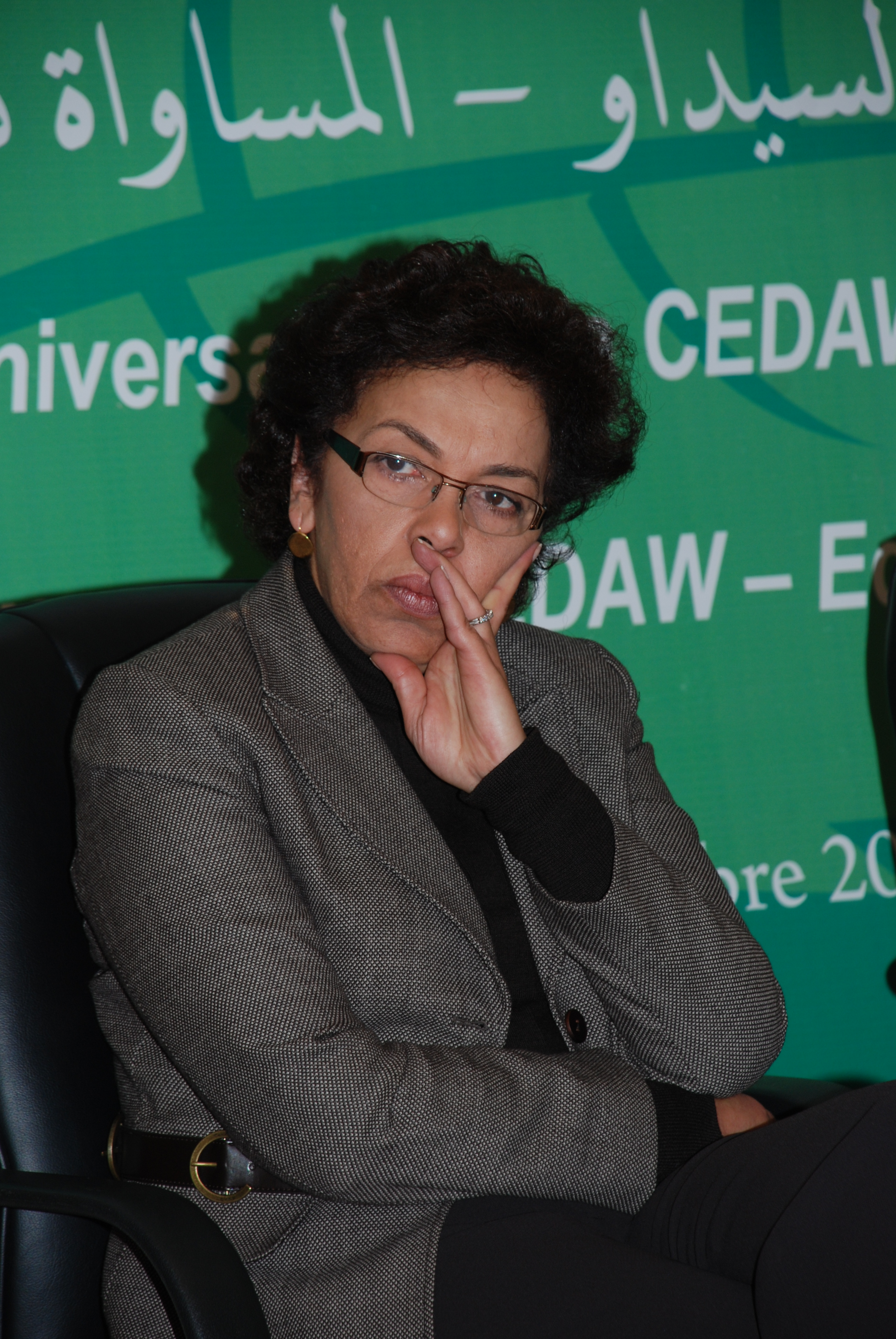 Photo prise lors de la la Célébration Régionale (MENA) du 30ème Anniversaire de l’adoption de la Convention CEDAW à Rabat - Maroc. crédit ADFM